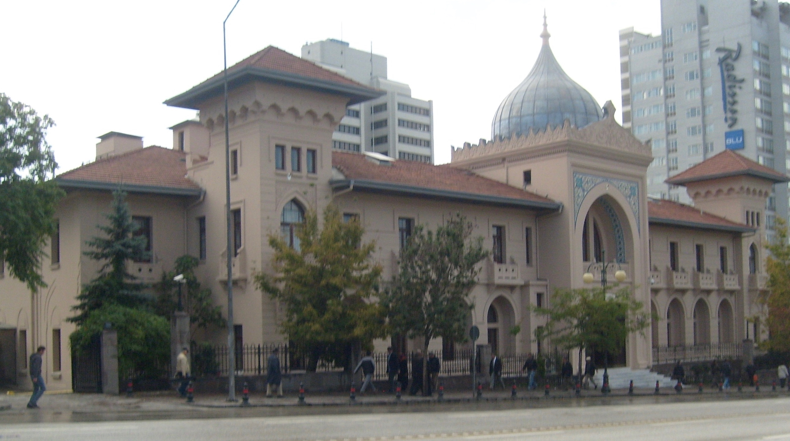 Ankara Palas. Mimar Kemaleddin’in eseridir. 1927 yılında tamamlanmıştır.